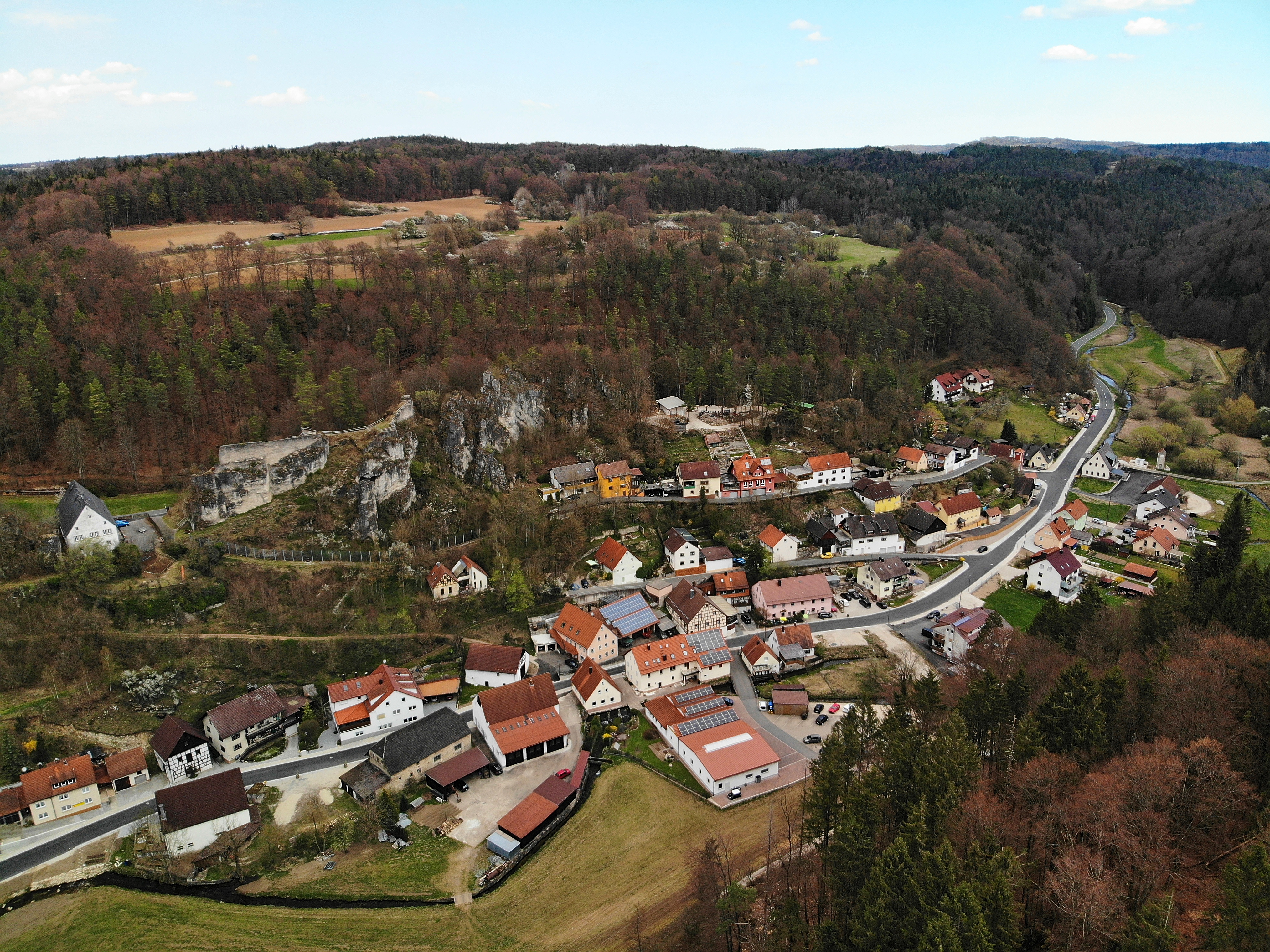 Wolfsberg (Obertrubach) Luftaufnahme (2020)